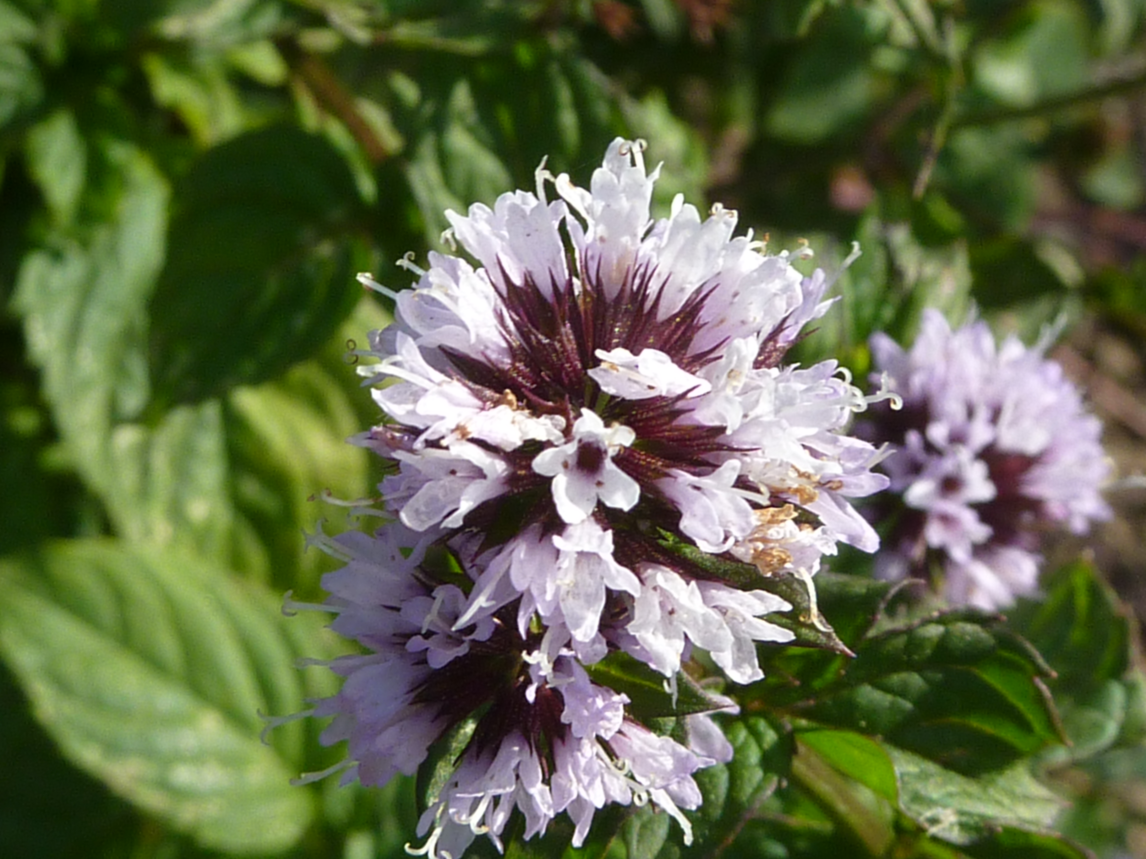 Mentha x piperita var. citrata 'Eau de Cologne Mint' (Labatae) flower